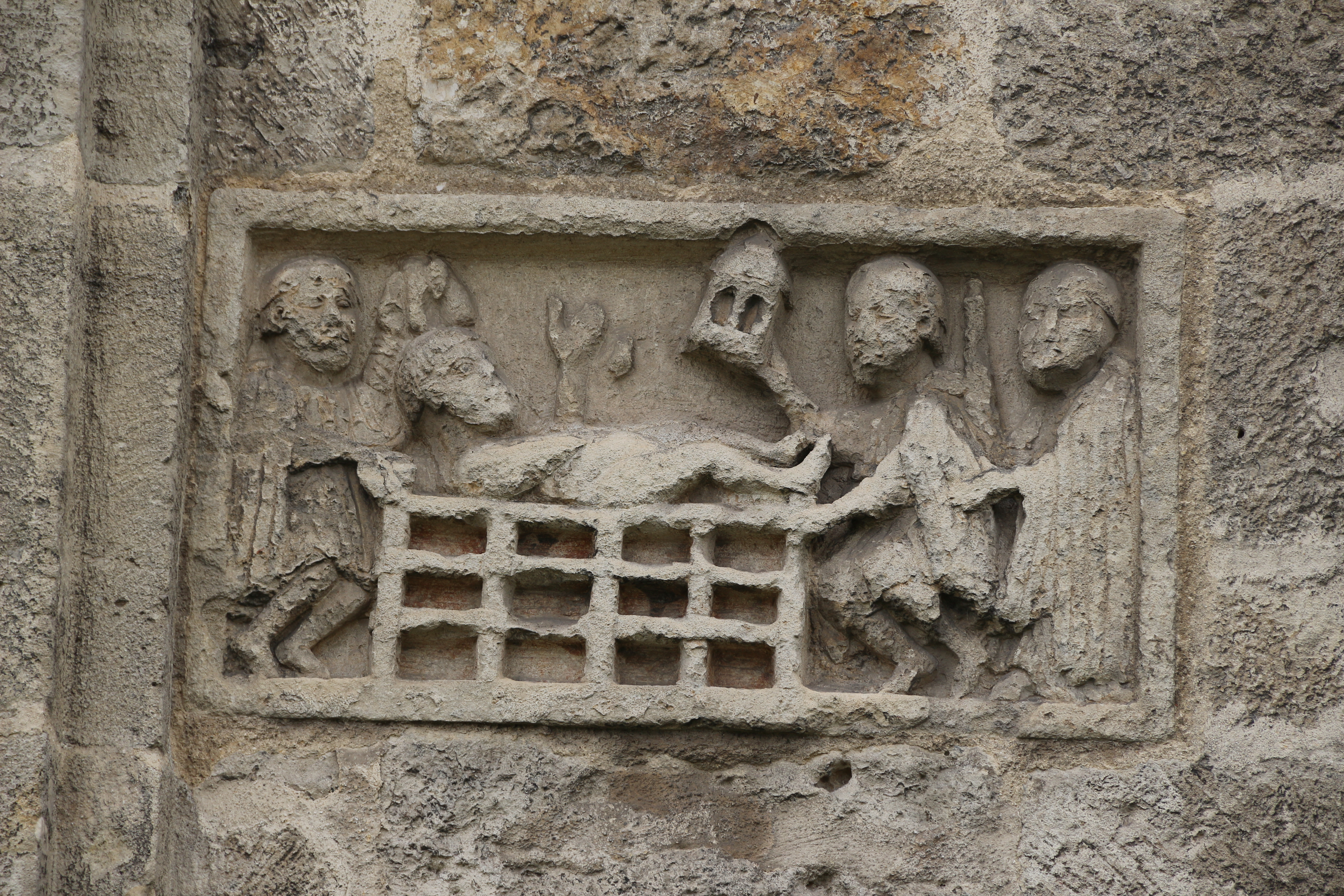 Kath. Pfarrkirche hl. Laurentius in Sollenau, Niederösterreich.